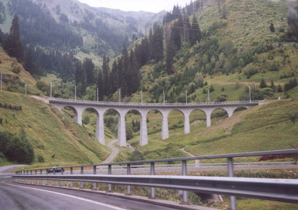 Blik in het Gotthardmassief. Achter deze brug bevindt zich een toegang tot de nieuwe Gotthard spoortunnel. Sedrun, zomer 2001, foto Angélique Leunissen